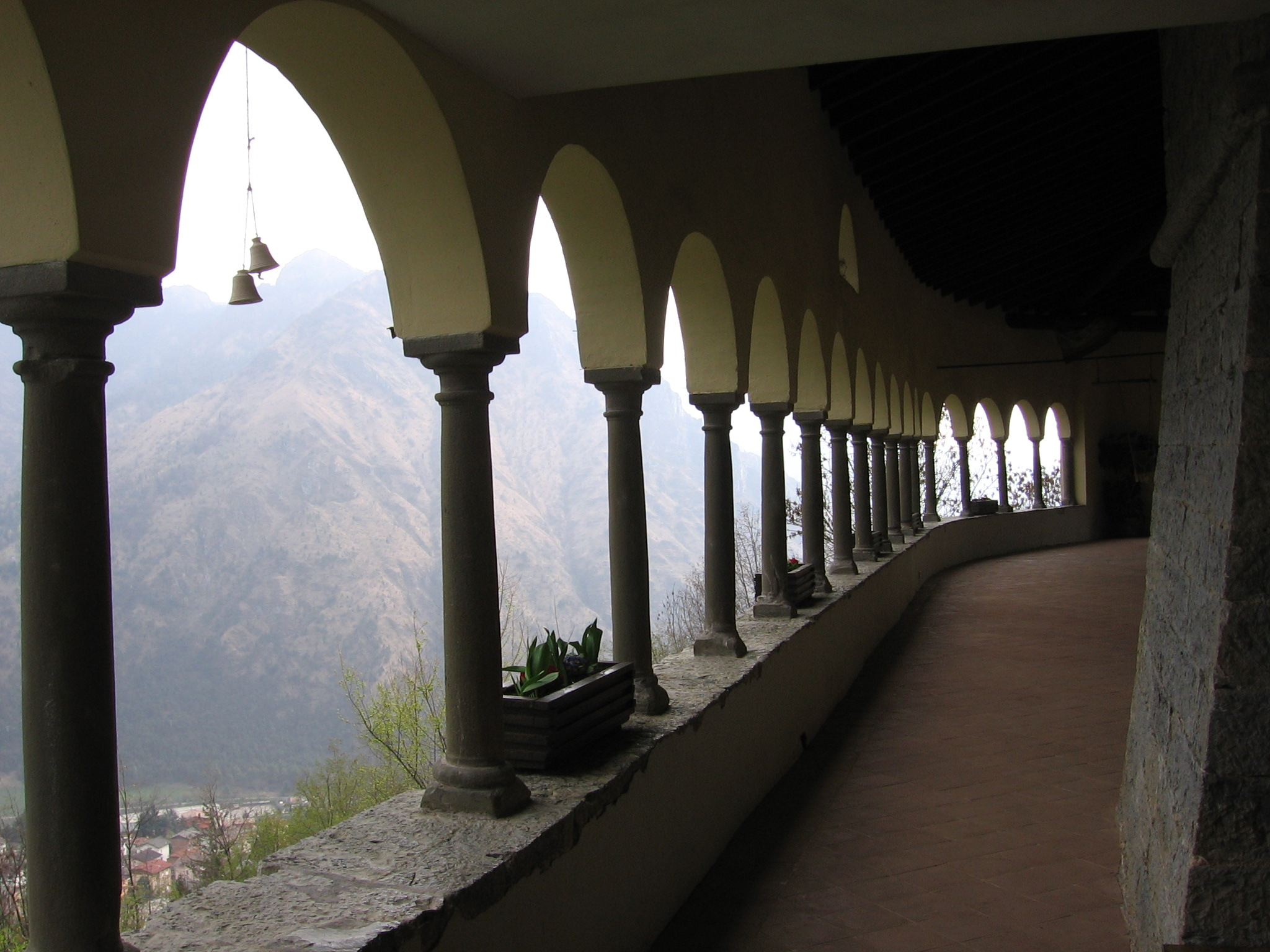 Parre, Bergamo, Italia